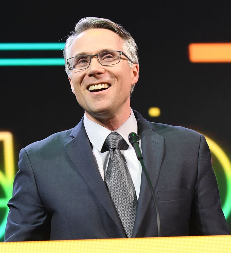 March 1, 2017